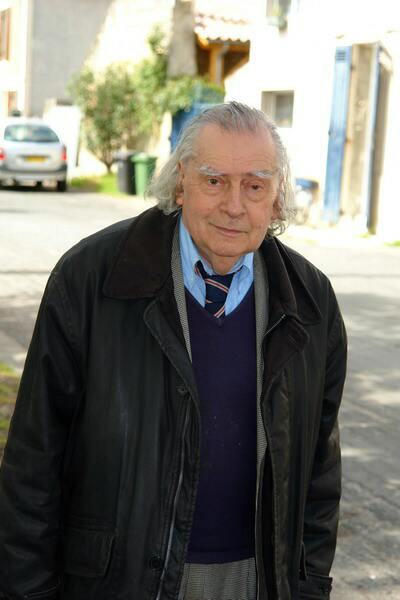 Paul Leuquet près de son atelier bordelais